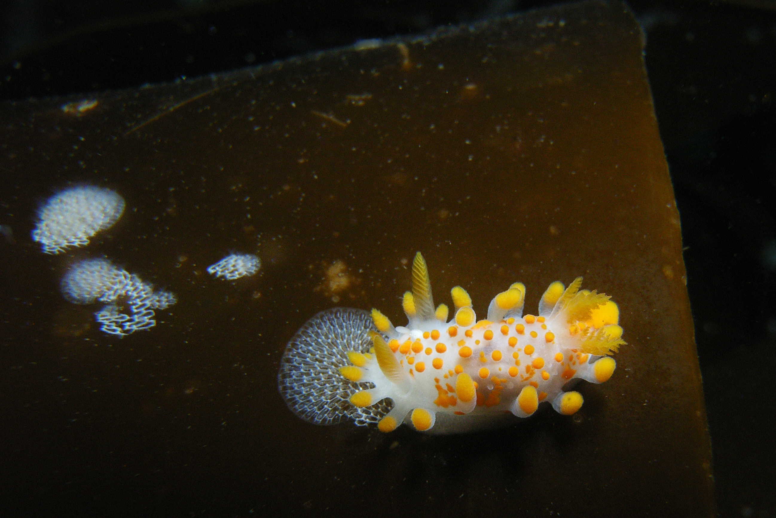 Animalia/Mollusca/Gastropoda/Heterobranchia/Nudibranchia/Doridina/Polyceridae/Limacia clavigera. Photo from Skagerakk, Sweden